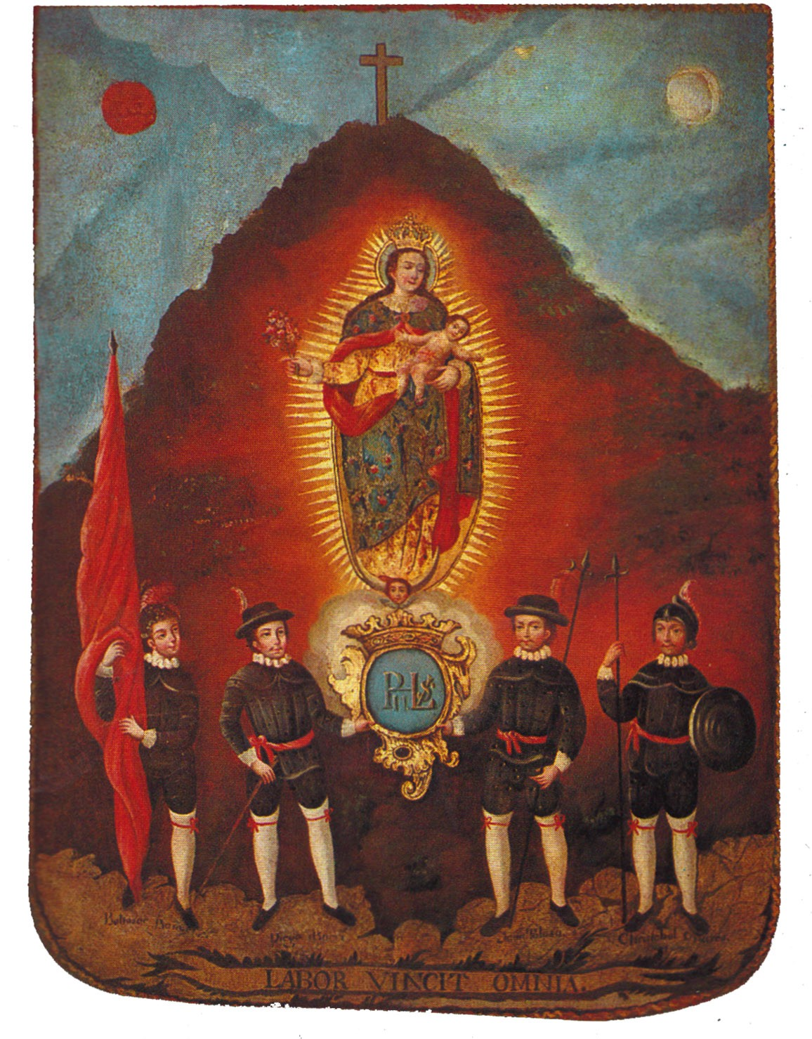 imagen del pendon original otorgado como escudo de armas al la Ciudad de Zacatecas, por Felipe II